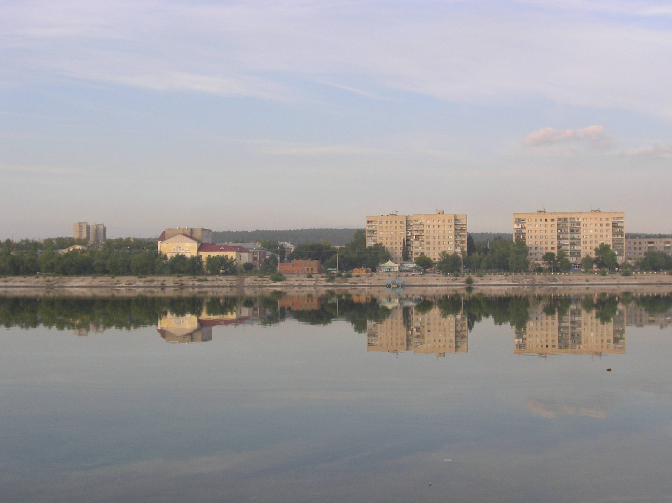 Улица Носова, Тольятти, Самарская область